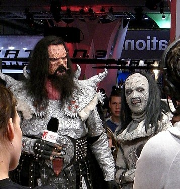 Mr. Lordi y Awa.